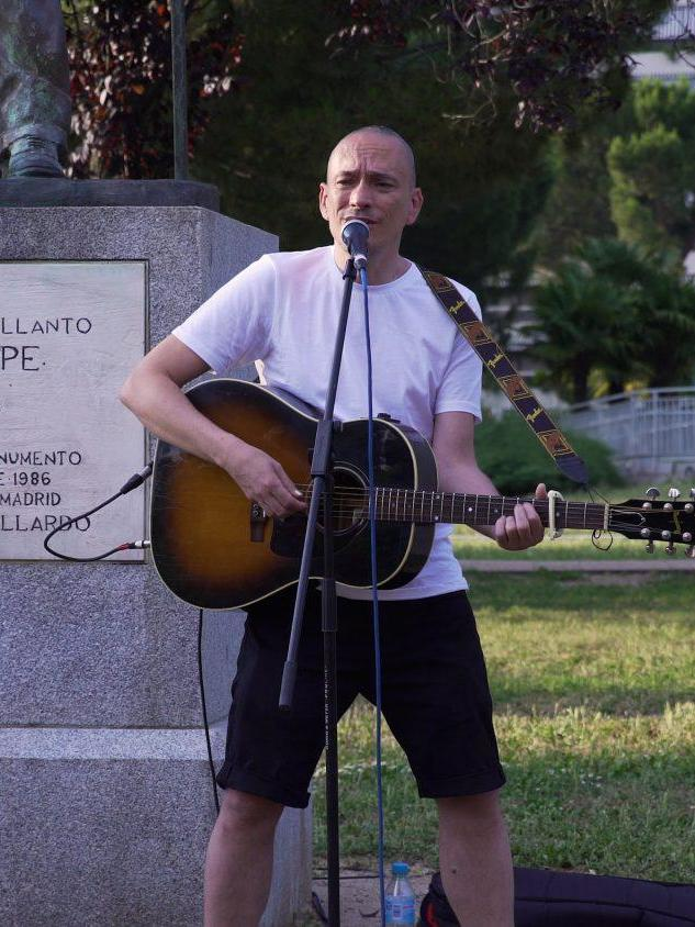 Las estatuas madrileñas continúan tomando la palabra. Dentro del ciclo ‘Nuestras estatuas hablan’, organizado por el área de Cultura y Deportes del Ayuntamiento de Madrid, para invitar a los madrileños y madrileñas a redescubrir el patrimonio escultórico de la ciudad a través de intervenciones artísticas, le llegó el turno al poeta León Felipe, del que este año se cumple el 50 aniversario de su muerte. La cantante Lekuona y el poeta y cantautor Javier Álvarez fueron esta vez los encargados de poner voz y música a la estatura de León Felipe, situada en el Parque Norte en el distrito de Fuencarral-El Pardo.